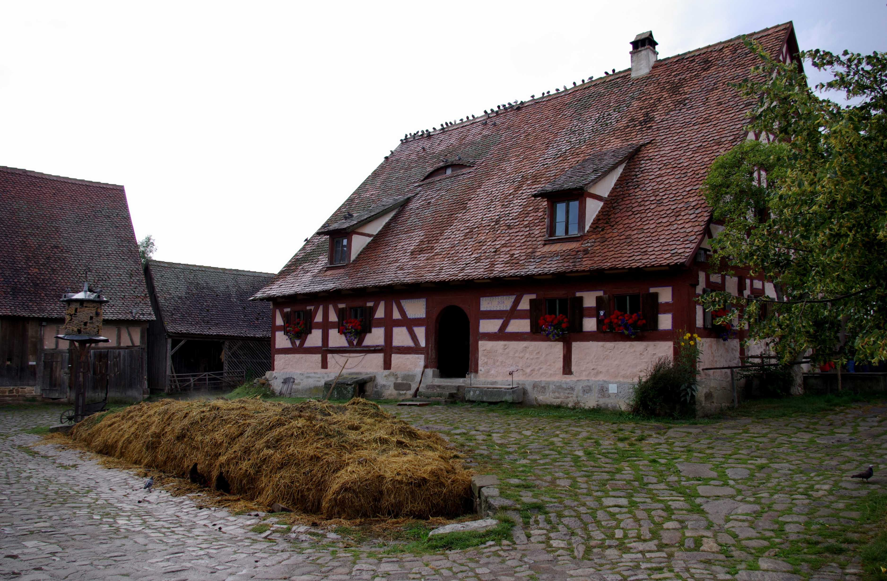 Ein Bauernhof mit Bauernhaus aus Seubersdorf (1684) und Misthaufen im Fränkischen Freilandmuseum Bad Windsheim